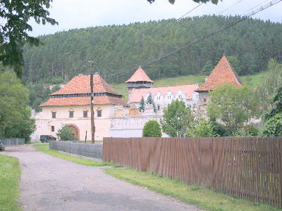 Castelul Lazar, judetul Harghita, foto: Iulian Hopulele